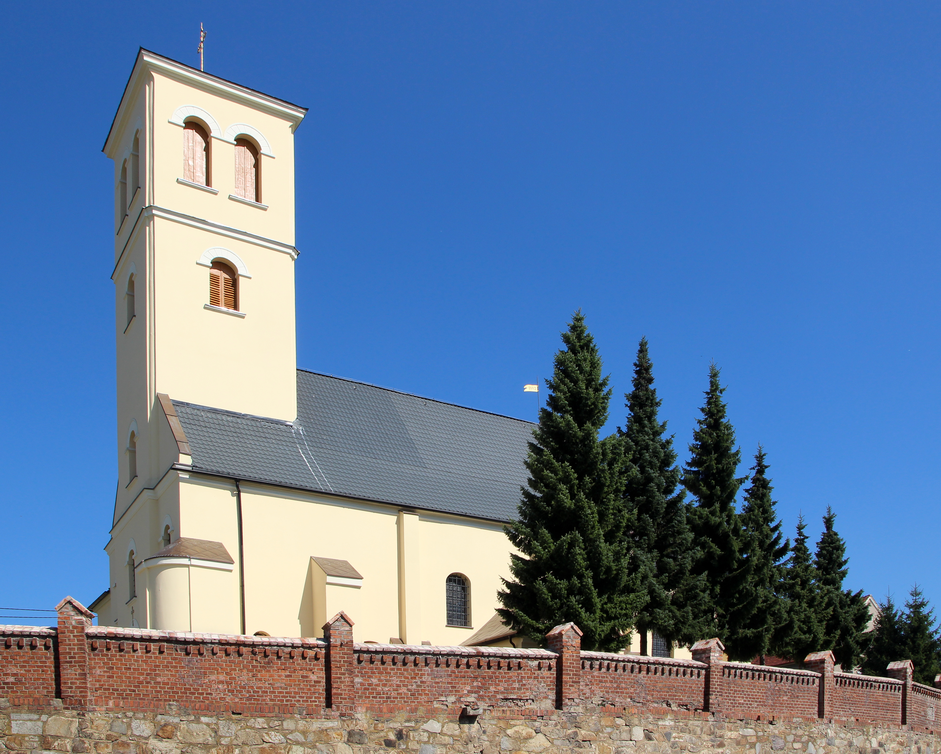 Kępnica – rzymskokatolicki kościół parafialny p.w. Wniebowzięcia NMP, XIII, XVIII, 1 poł. XIX.